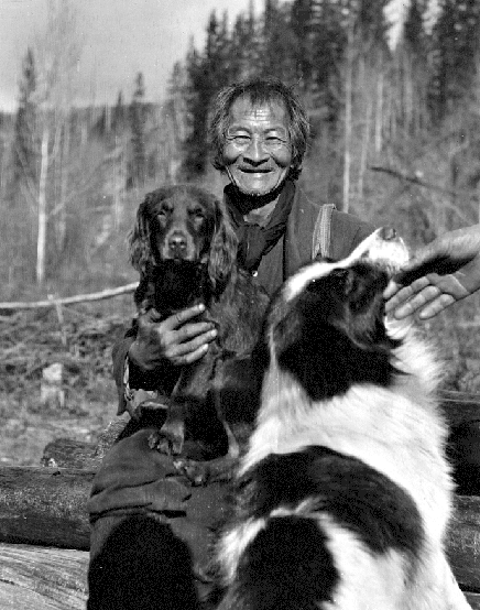 Ah Hoo Omineca Miner at Germansen